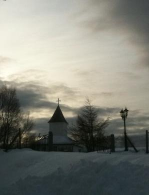 Bilete av kapellet og krossen sett frå Berle Kyrkje